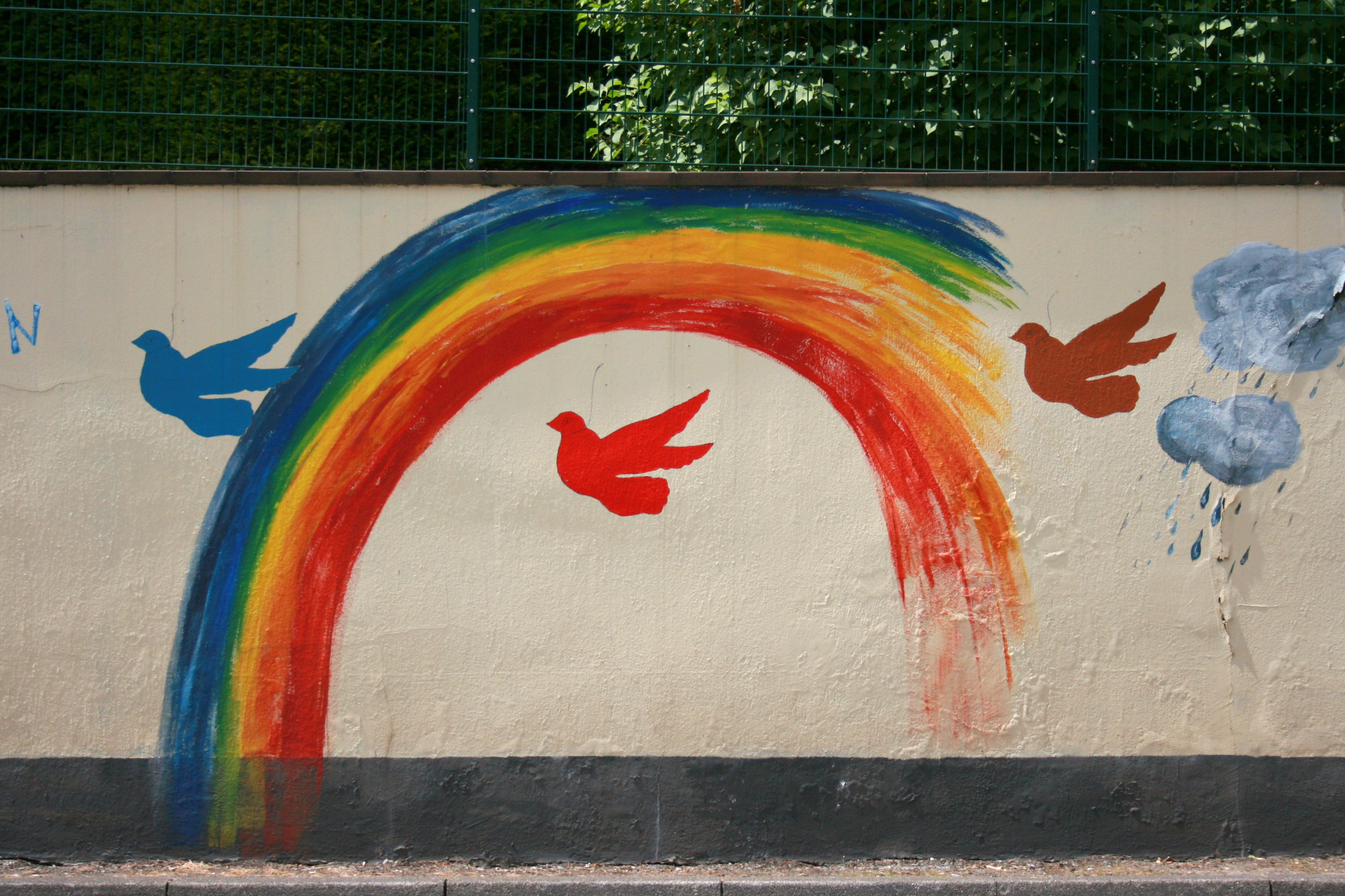 Dahler Straße in Neuenrade